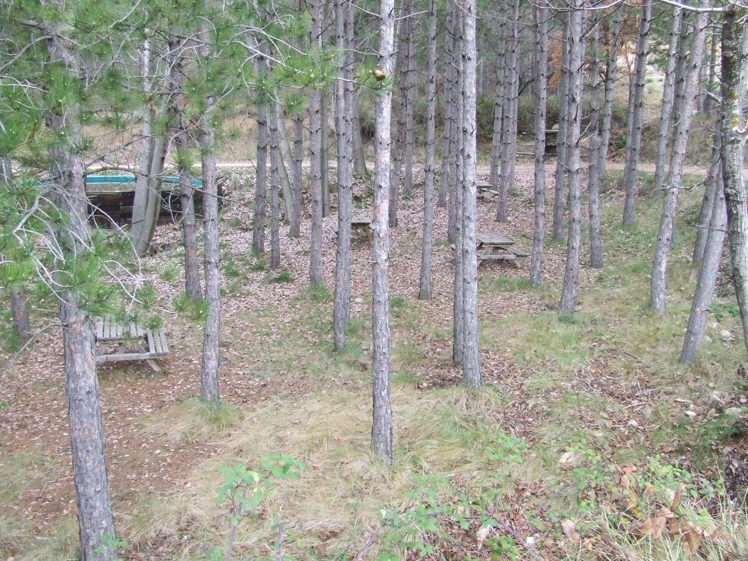 Àrea de la Font de les Trilles (Herba-savina, Hortoneda de la Conca, Conca de Dalt, Pallars Jussà)